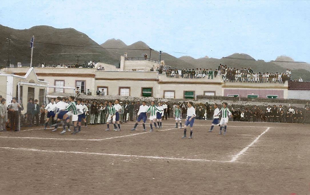 El Real Betis atacando en uno de los partidos que le enfrentó al Tenerife Sporting en noviembre de 1919. Mucha expectación en el Campo de Miraflores y en las azoteas cercanas. Fotografía coloreada.